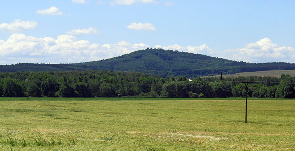 Křížový vrch nedaleko Stodu.